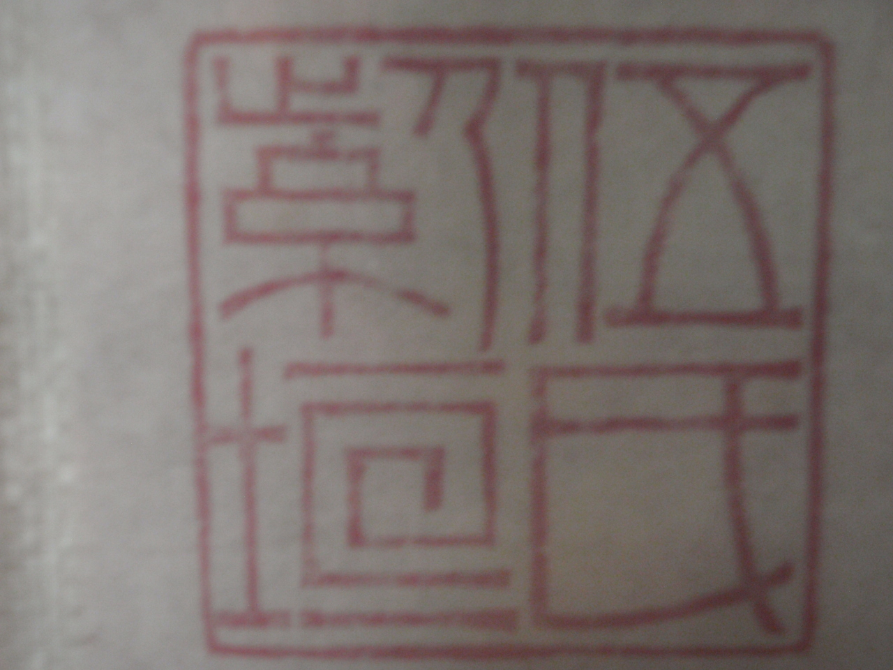 粵語: 伍氏紫垣印章